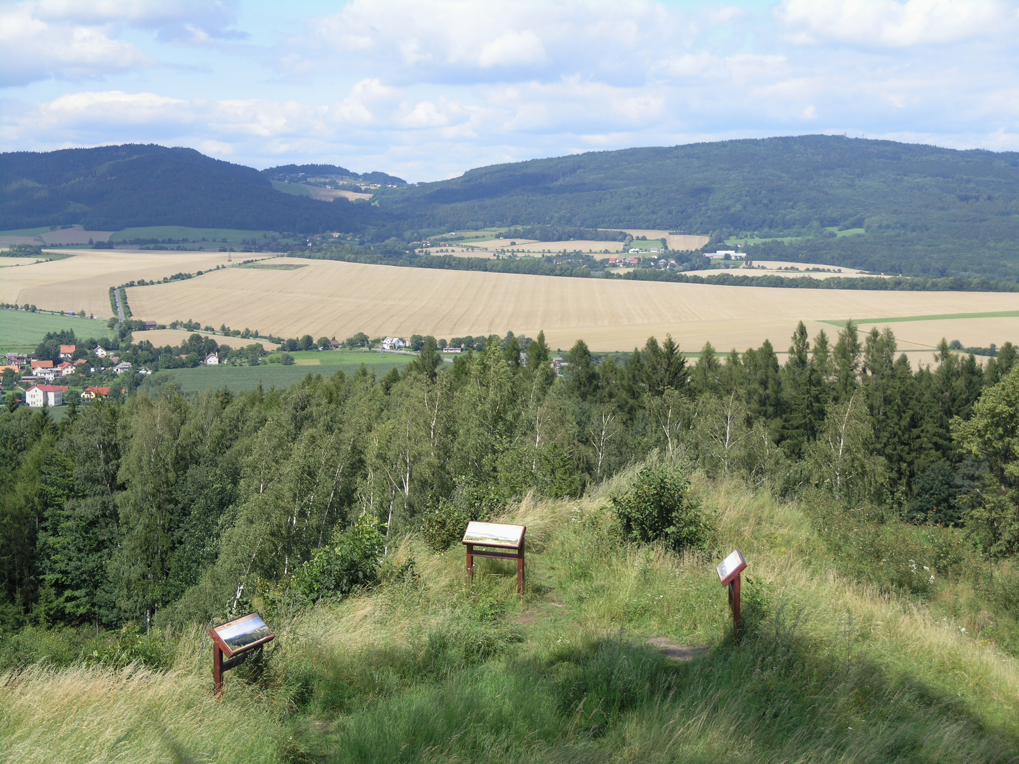 Výhled z vrchu Brada přes informační cedule